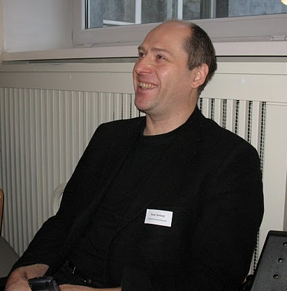 Tanel Tammet Erakonna Eestimaa Rohelised Tallinna piirkonna asutamiskoosolekul Tallinna Ülikooli peahoones.